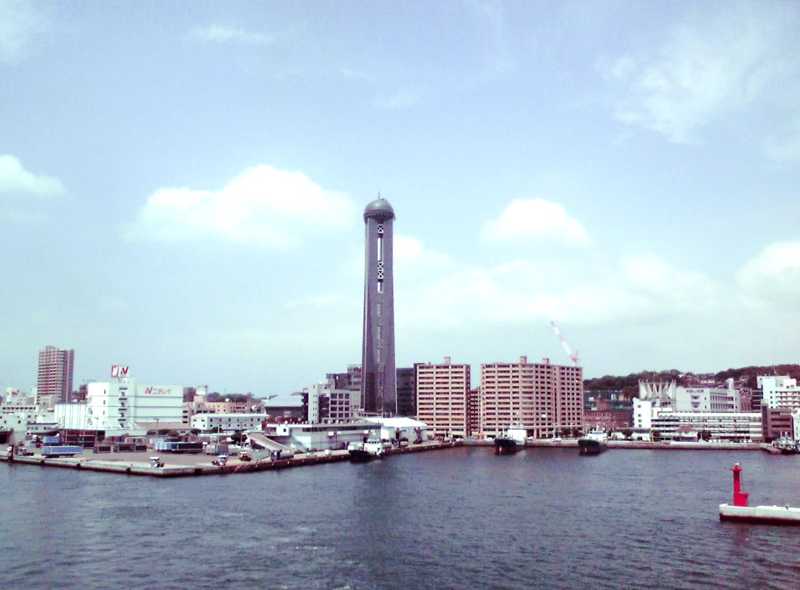 下關市市區街景